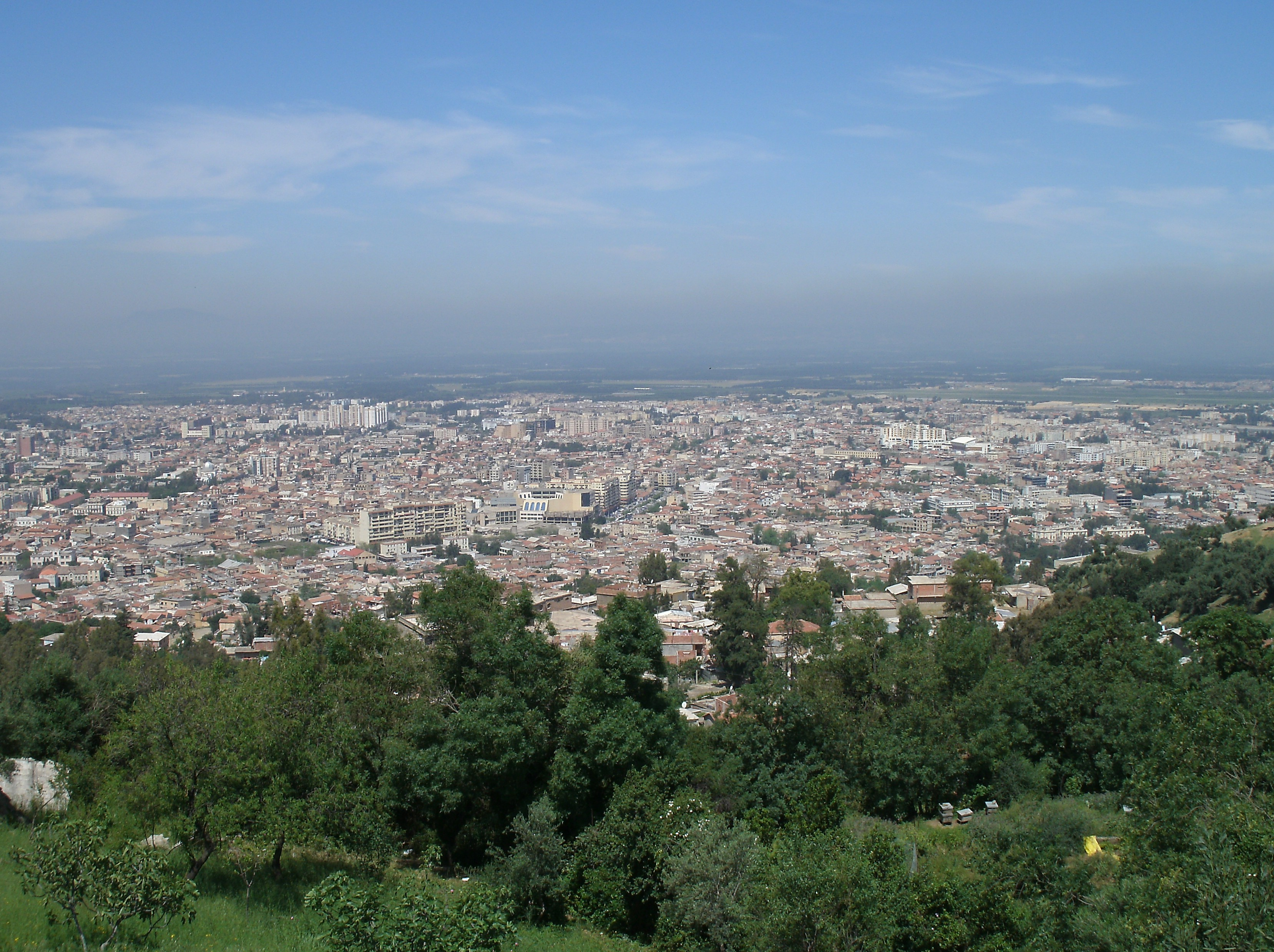 Blida